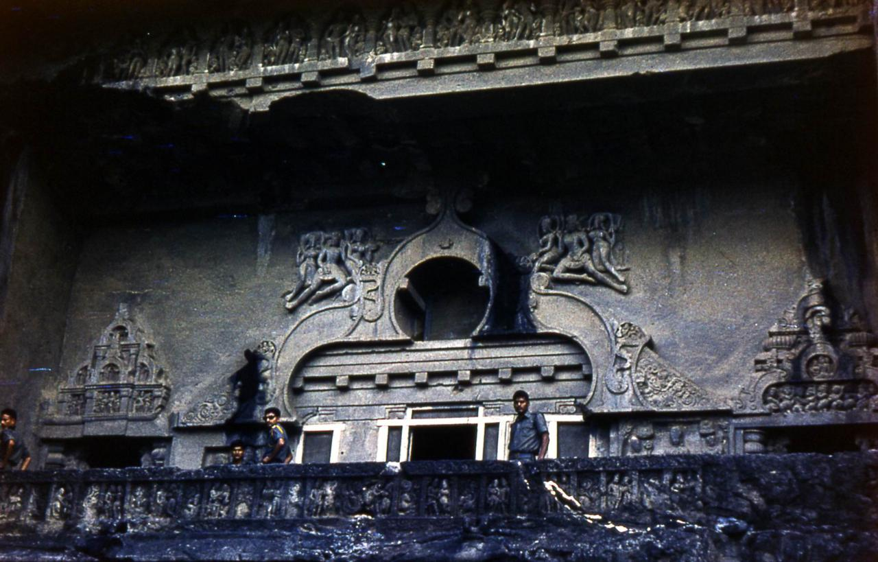 Эллора. Пещерный храм